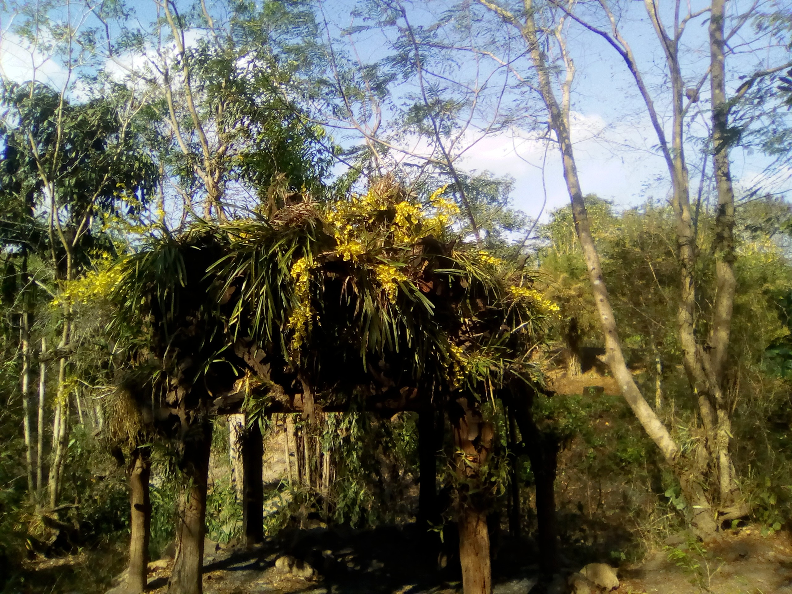 lan rừng